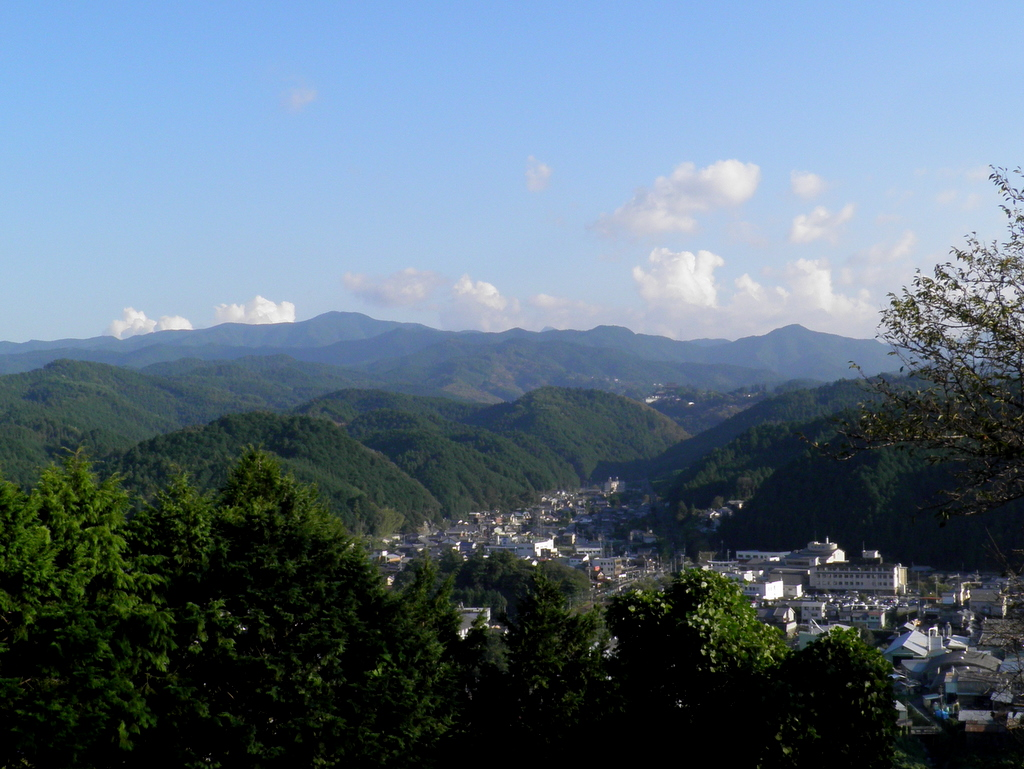 吉野山を大和仏舎利塔から撮る。（奈良県吉野郡吉野町）